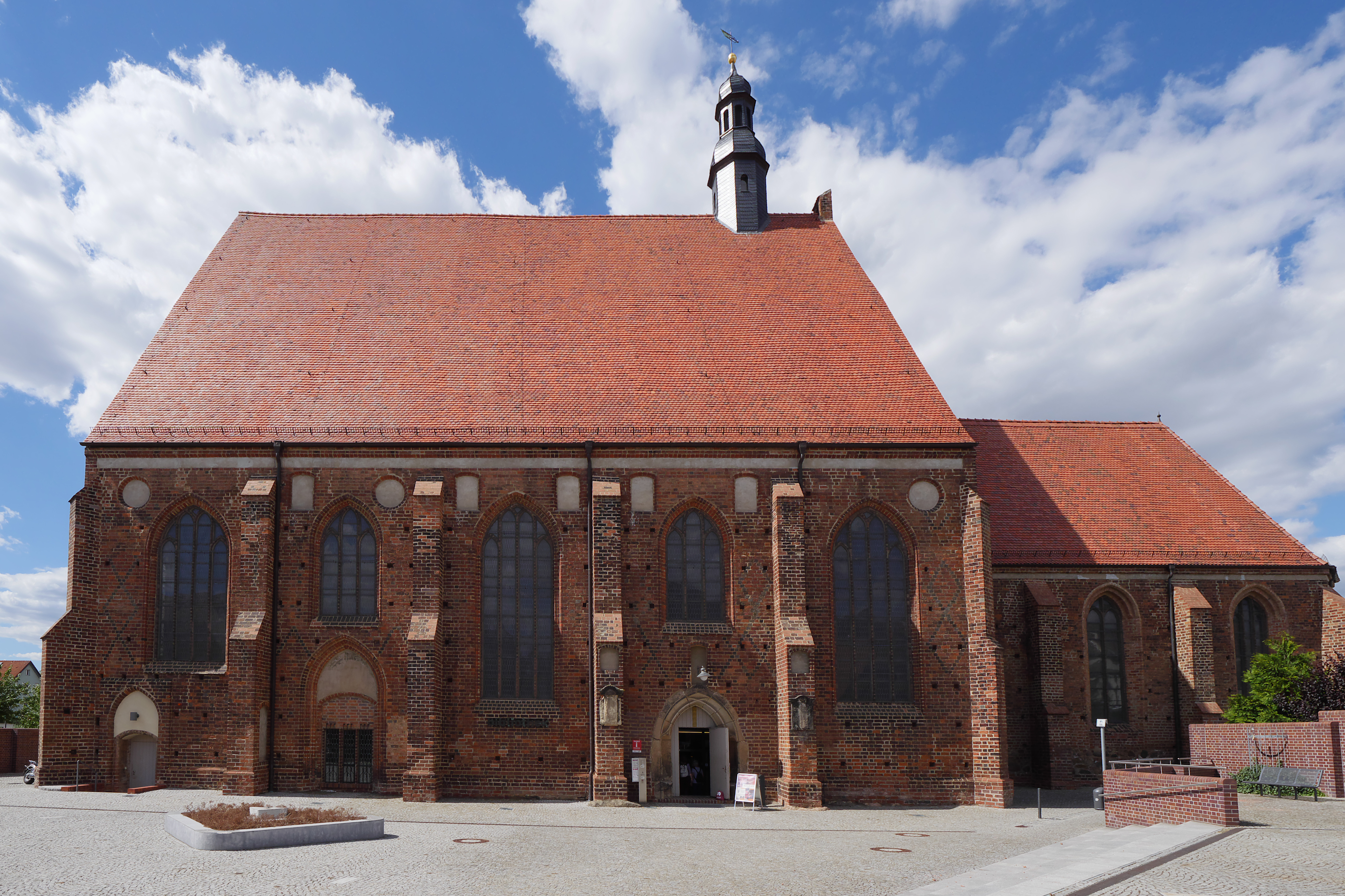 Mönchenkirche in Jüterbog, Ansicht von Süden